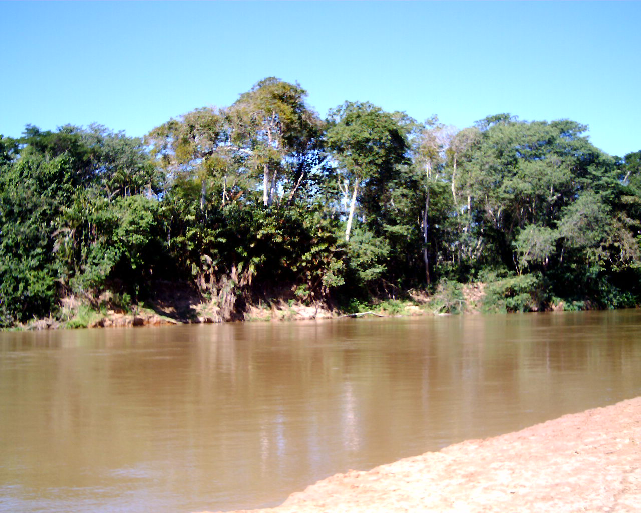 Rio Mearim (Povoado Santa Cantídia Pedreiras/MA)